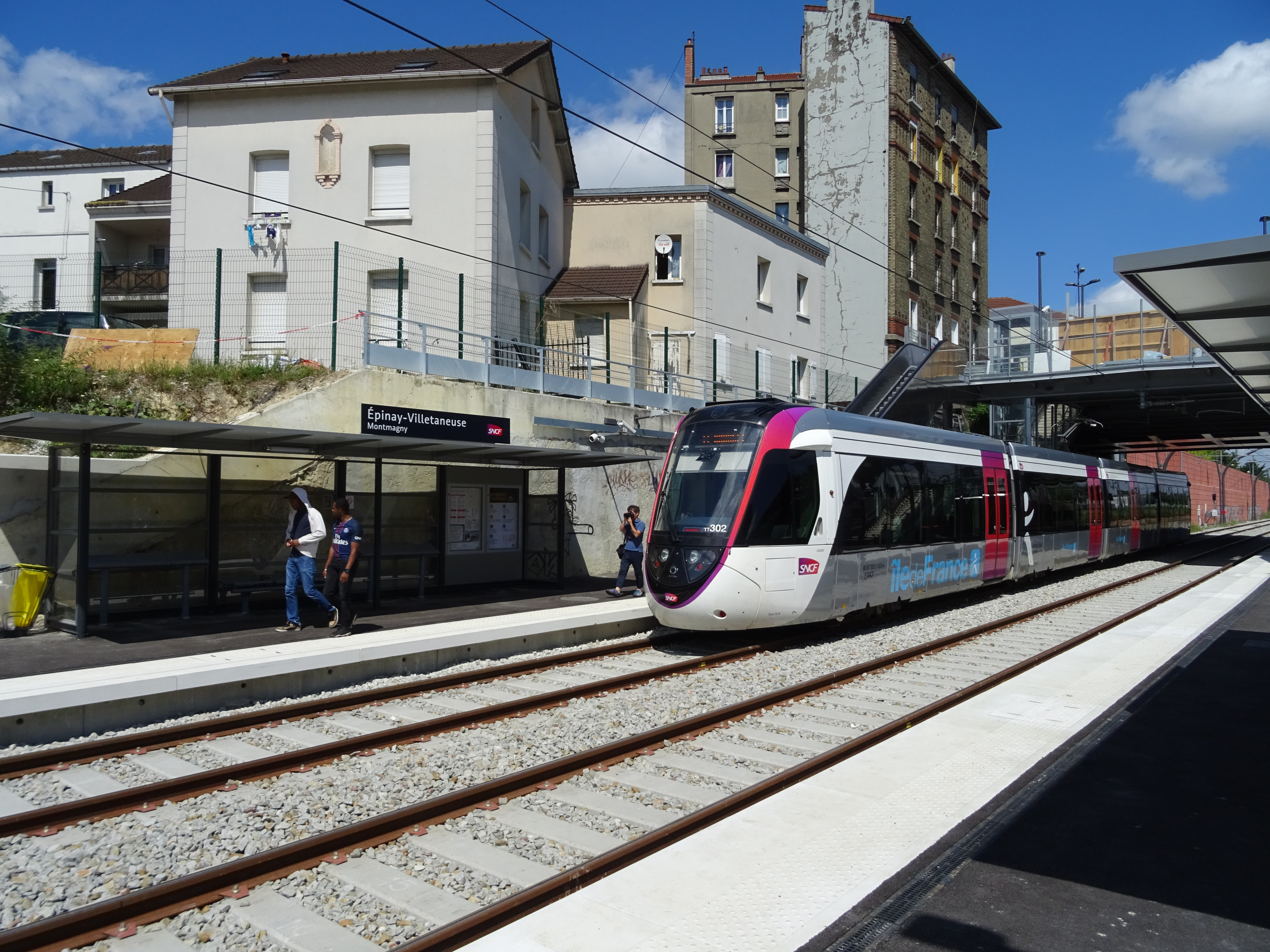 U 53600 à quai à proximité de l'abri de la gare d'Epinay-Villetaneuse (Montmagny) direction Le Bourget.